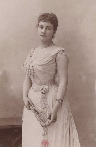 Emma Eames soprano américaine